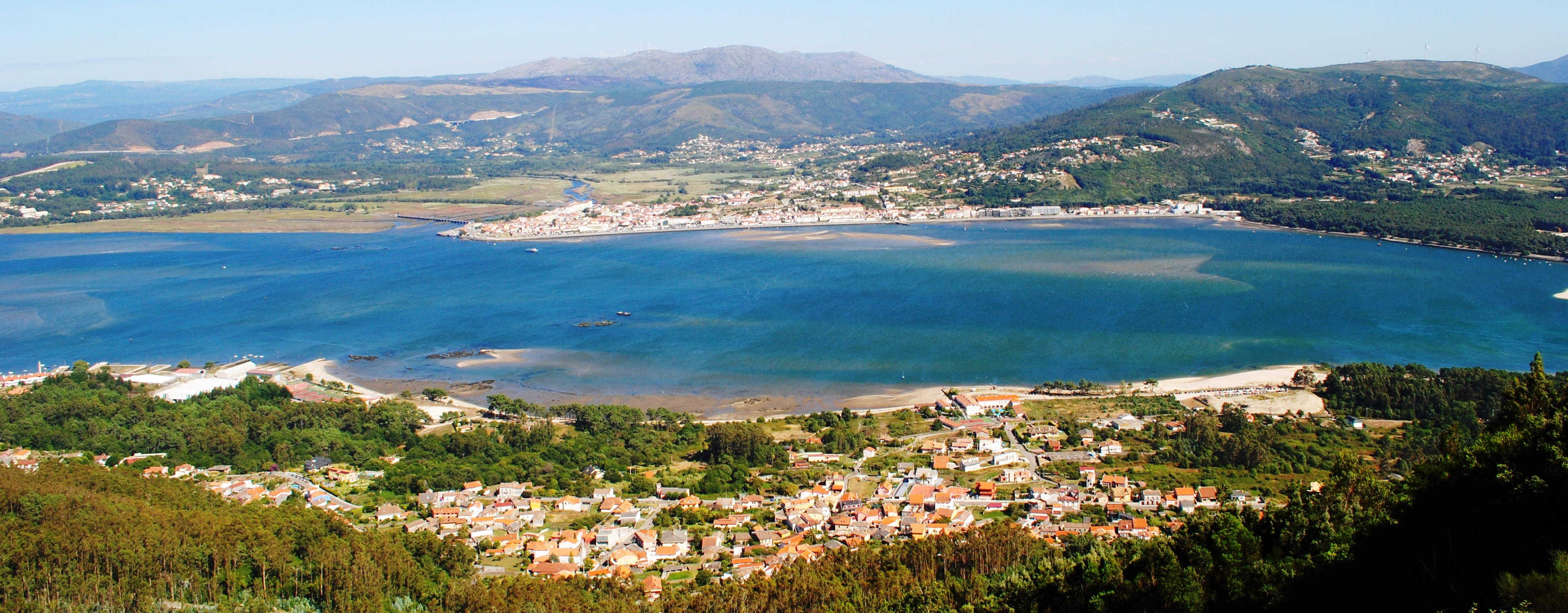 Caminha e Camposancos